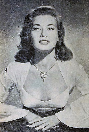 Peggy Dow